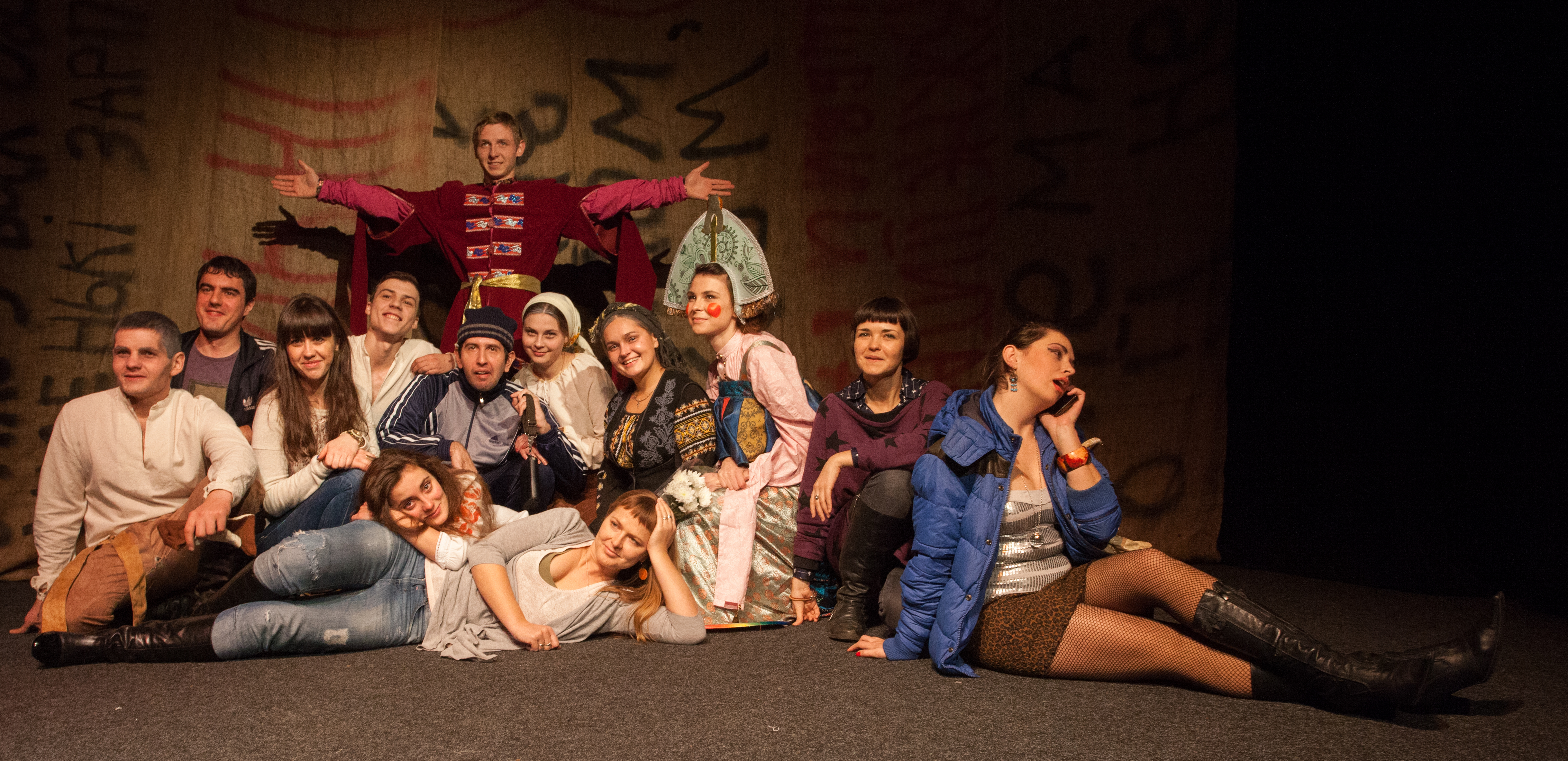 ЧЕсний театр. Фото після вистави "Бояриня"